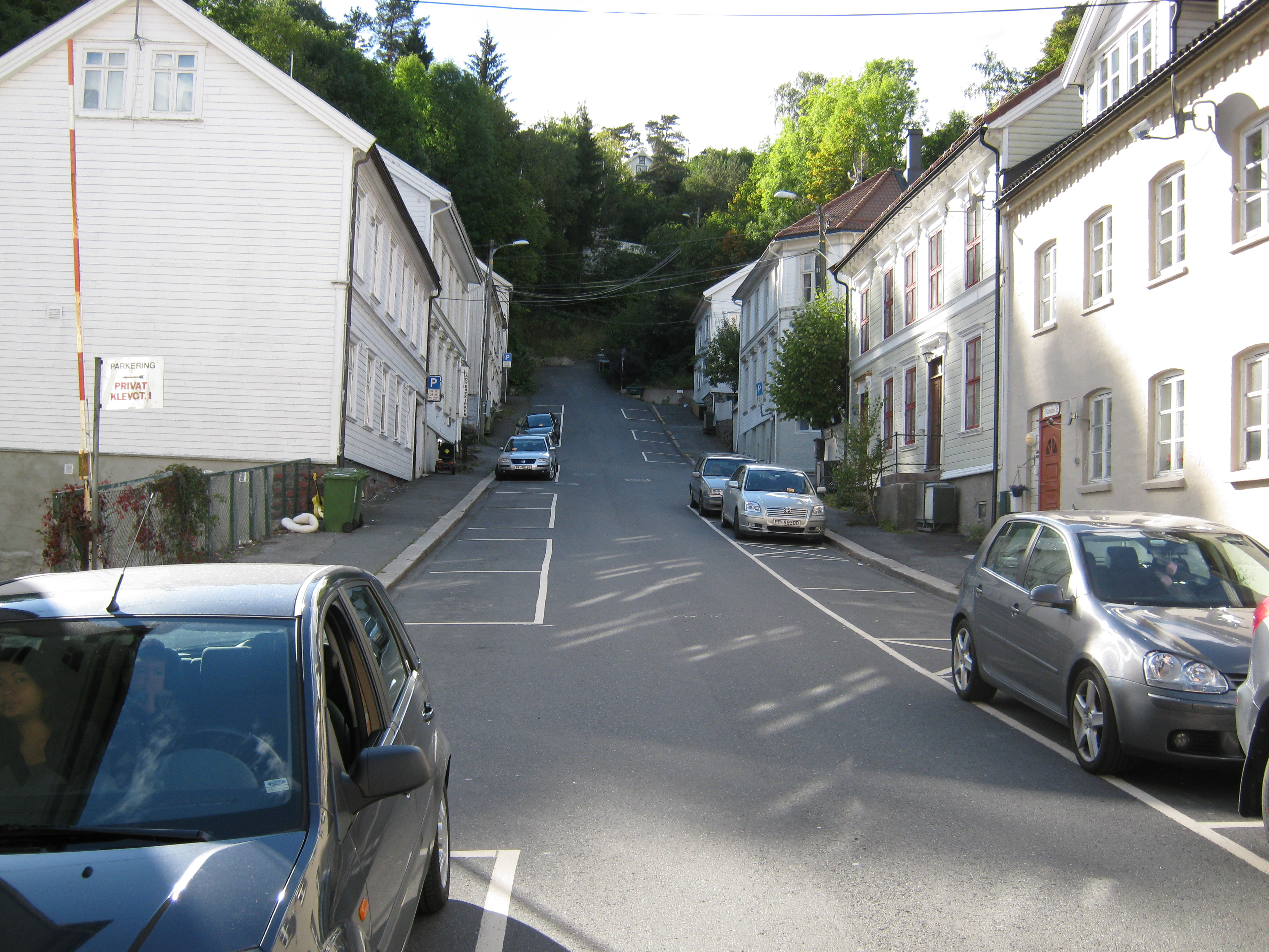 Klevgaten i Arendal, tatt fra Vestregate